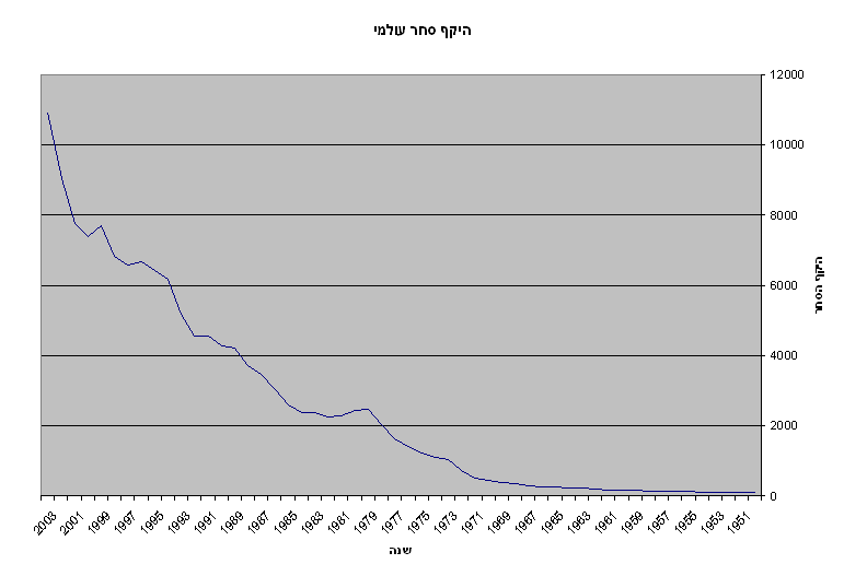 שינויים בהיקף הסחר העולמי, לפי סכום. ההיקף מבוטא כגידול באחוזים ביחס לשנת 1951, שהיא 100%. נוצר על ידי משתמש:Felagund, בהתבסס על נתוני ארגון הסחר העולמי.